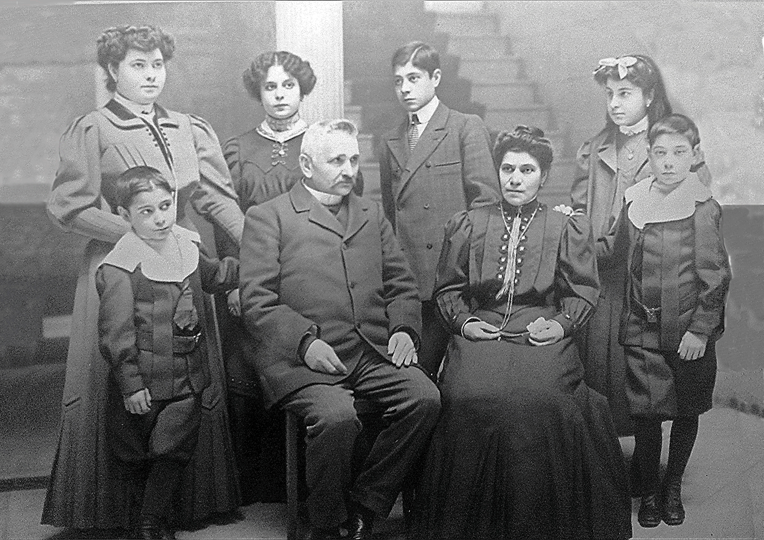 El constructor y dueño del Hotel Castilla de Toledo rodeado de su familia poco tiempo después de su inauguración